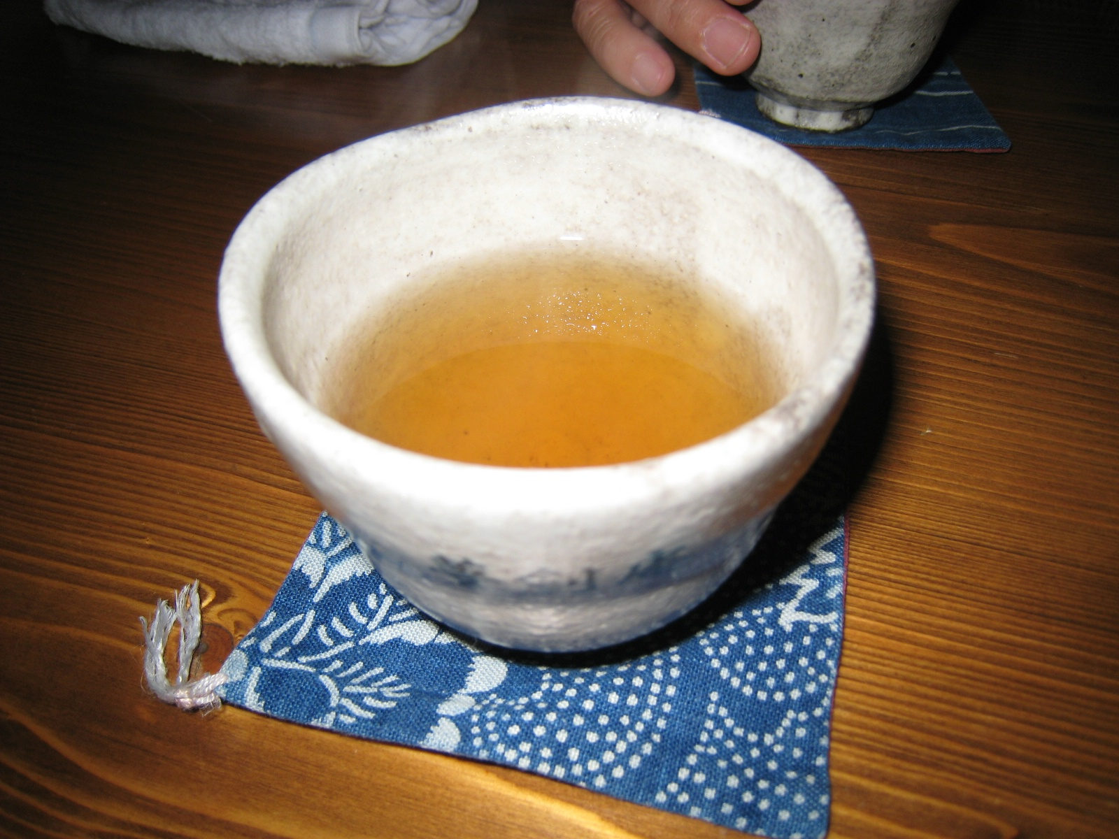 そばの実を原料として、脱皮、焙煎加工したお茶。